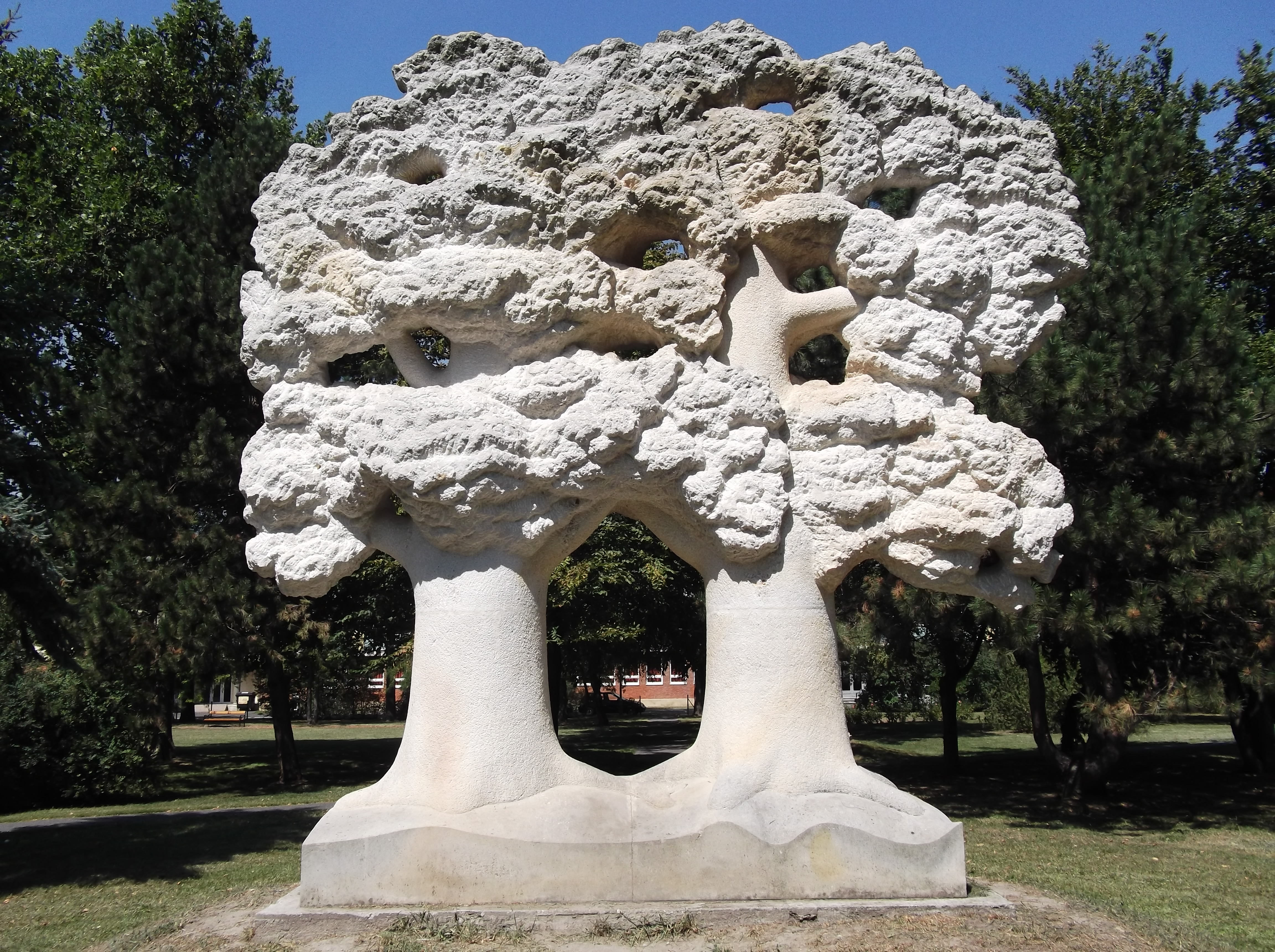 Lengyel–magyar barátság-emlékmű, Győr, Hungary